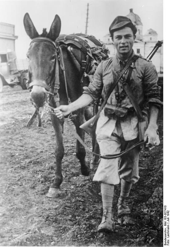 An der Sowjetfront bei Charkow: Ein italienischer Soldat mit seinem treuen Muli. PK-Aufnahme Kriegsberichter Lachmann 4259-42 fr. Fr.OKW. Juli 1942